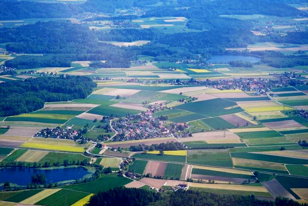 Aeschisee und Inkwilersee unesco welterbe pfahlbauten